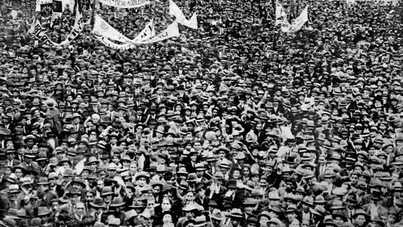 Manifestación aprista en la Plaza de Acho, agosto de 1931, en el marco de la campaña electoral desarrollada en el Perú, durante el gobierno de la Junta de Samanez Ocampo.